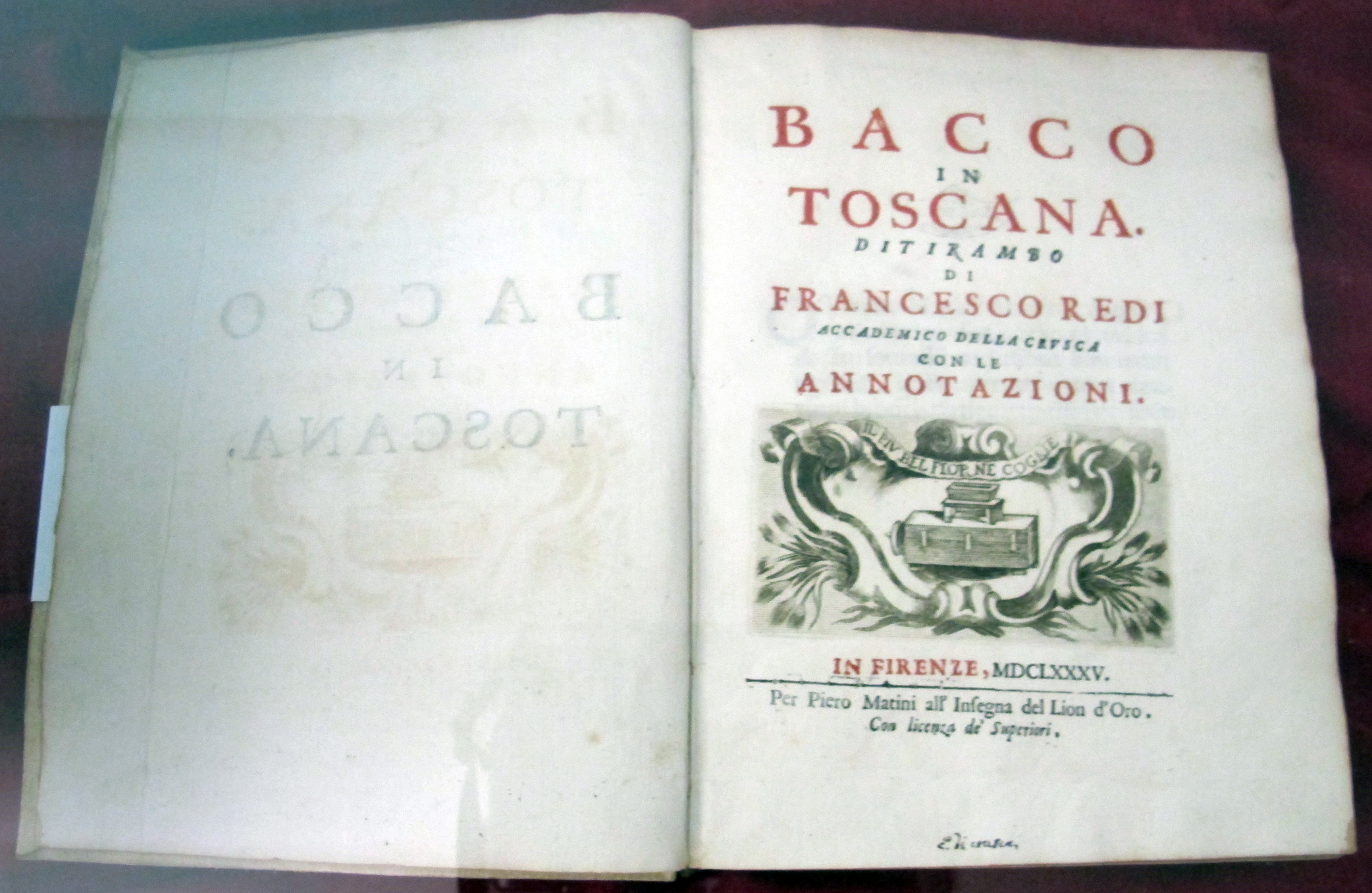 Biblioteca Malatestiana - MIBAC This is a photo of a monument which is part of cultural heritage of Italy.